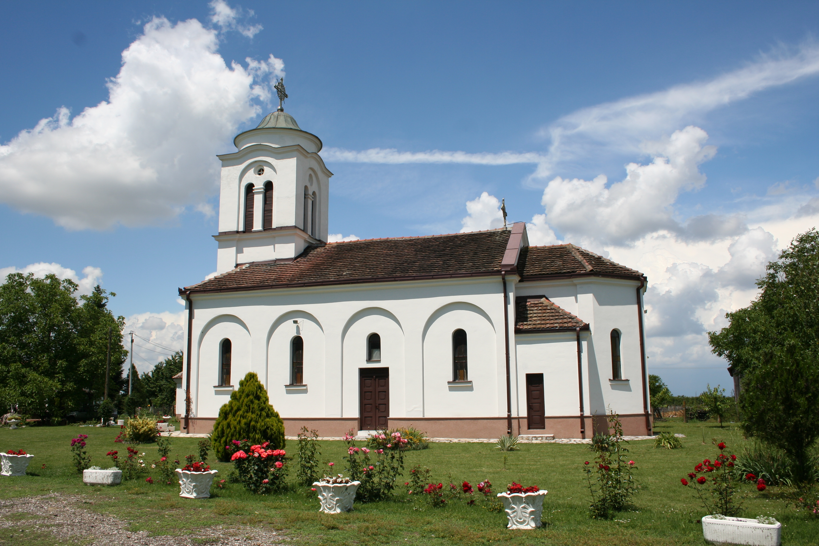 Crkva posvećena Svetoj Trojici u Lojanicama, opština Vladimirci